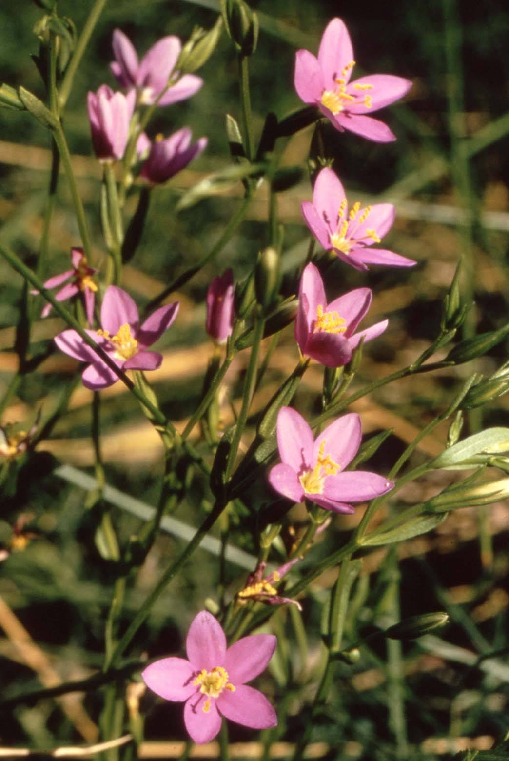 Centaurium calycosum at Organ Pipe Cactus Nat'l Monument, Arizona, USA